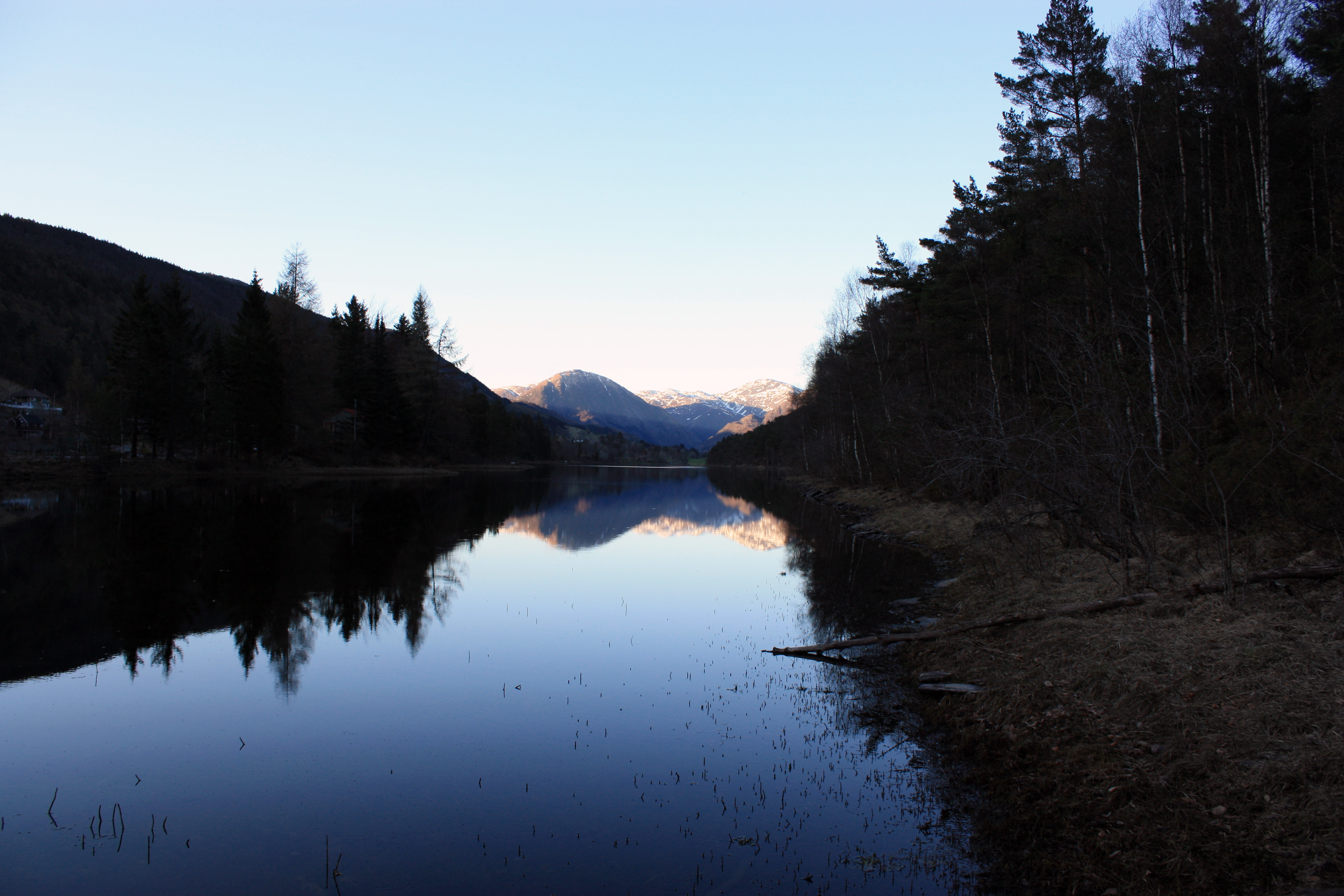 Hauglandsvatnet, Fana, Bergen, Norway